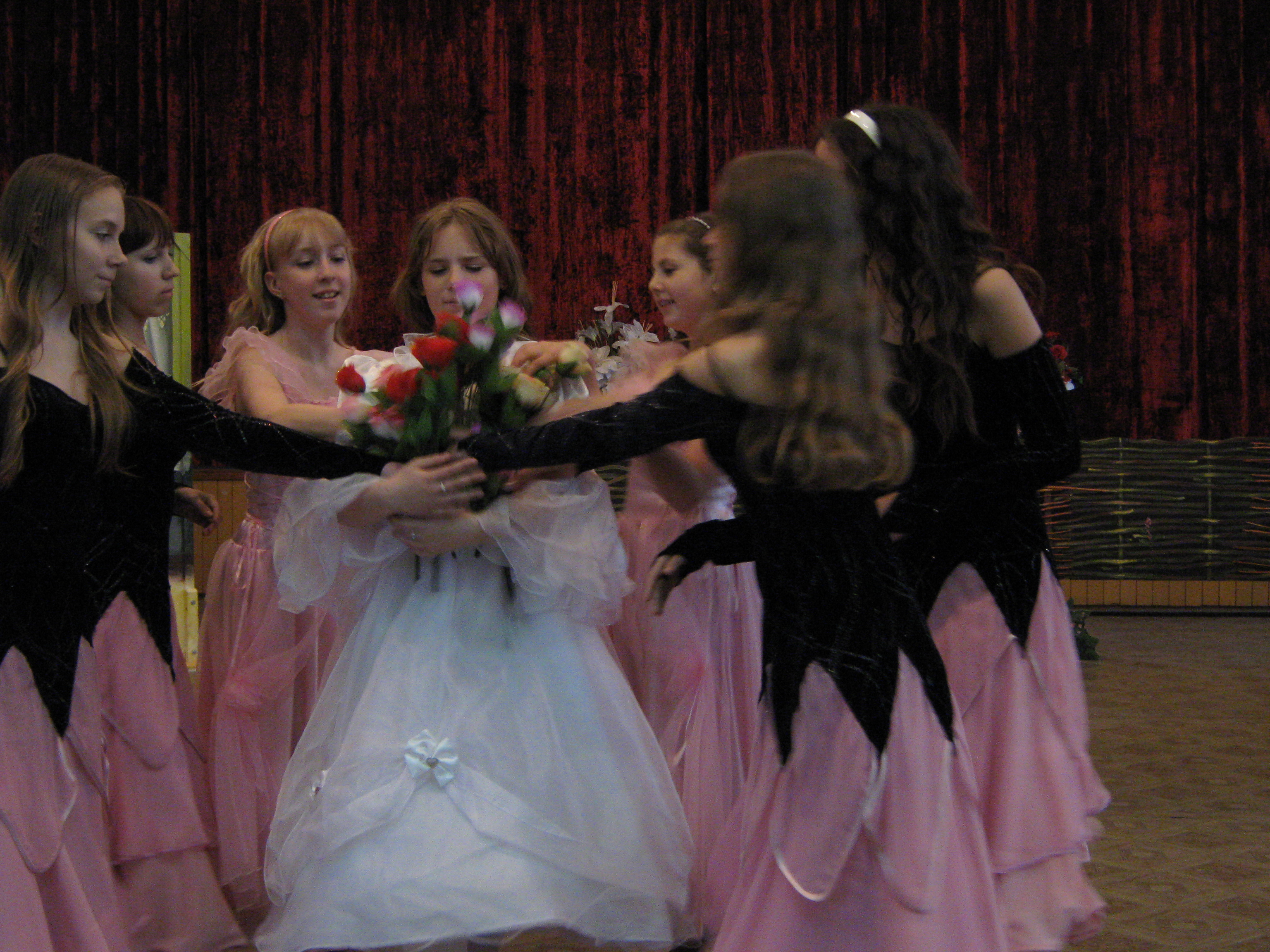 Хореографическое отделение